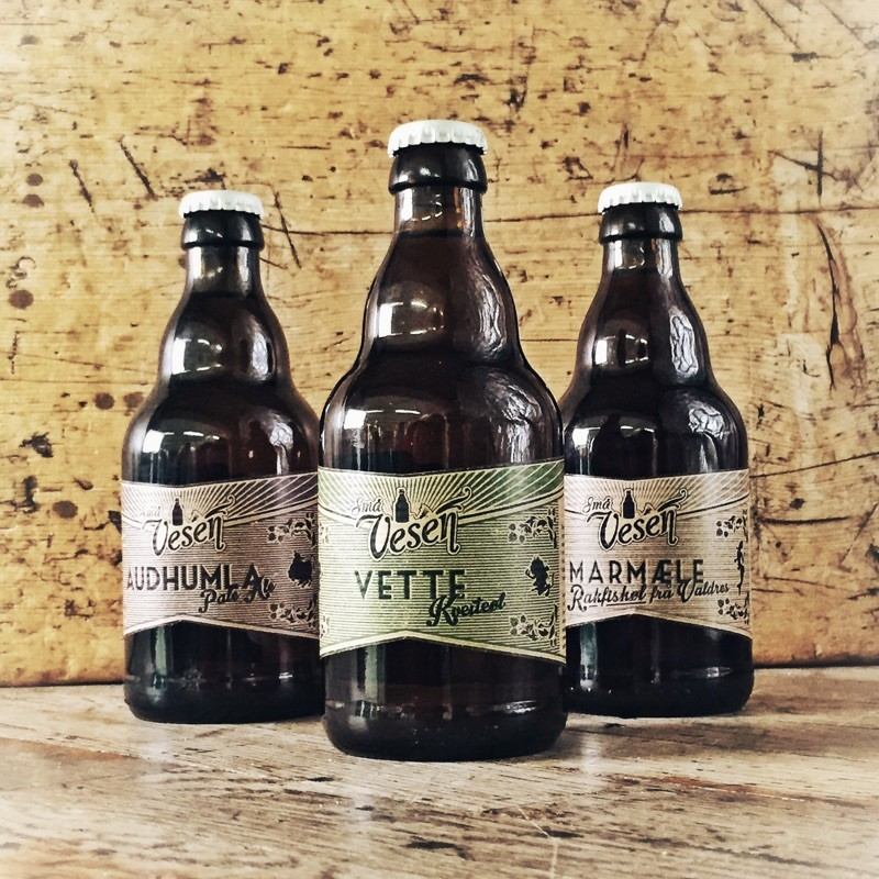 Øl fra Små Vesen